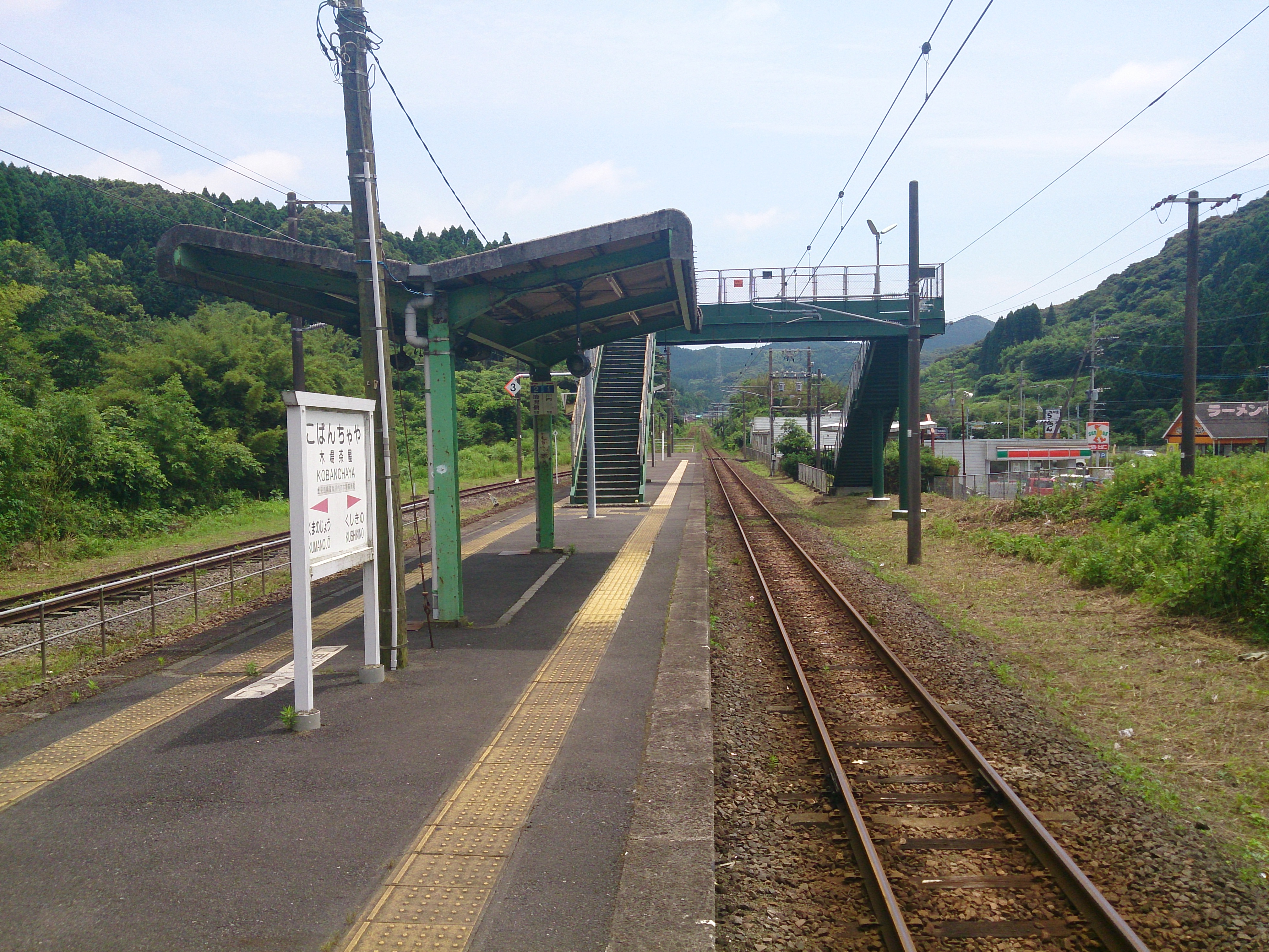 木場茶屋駅ホーム